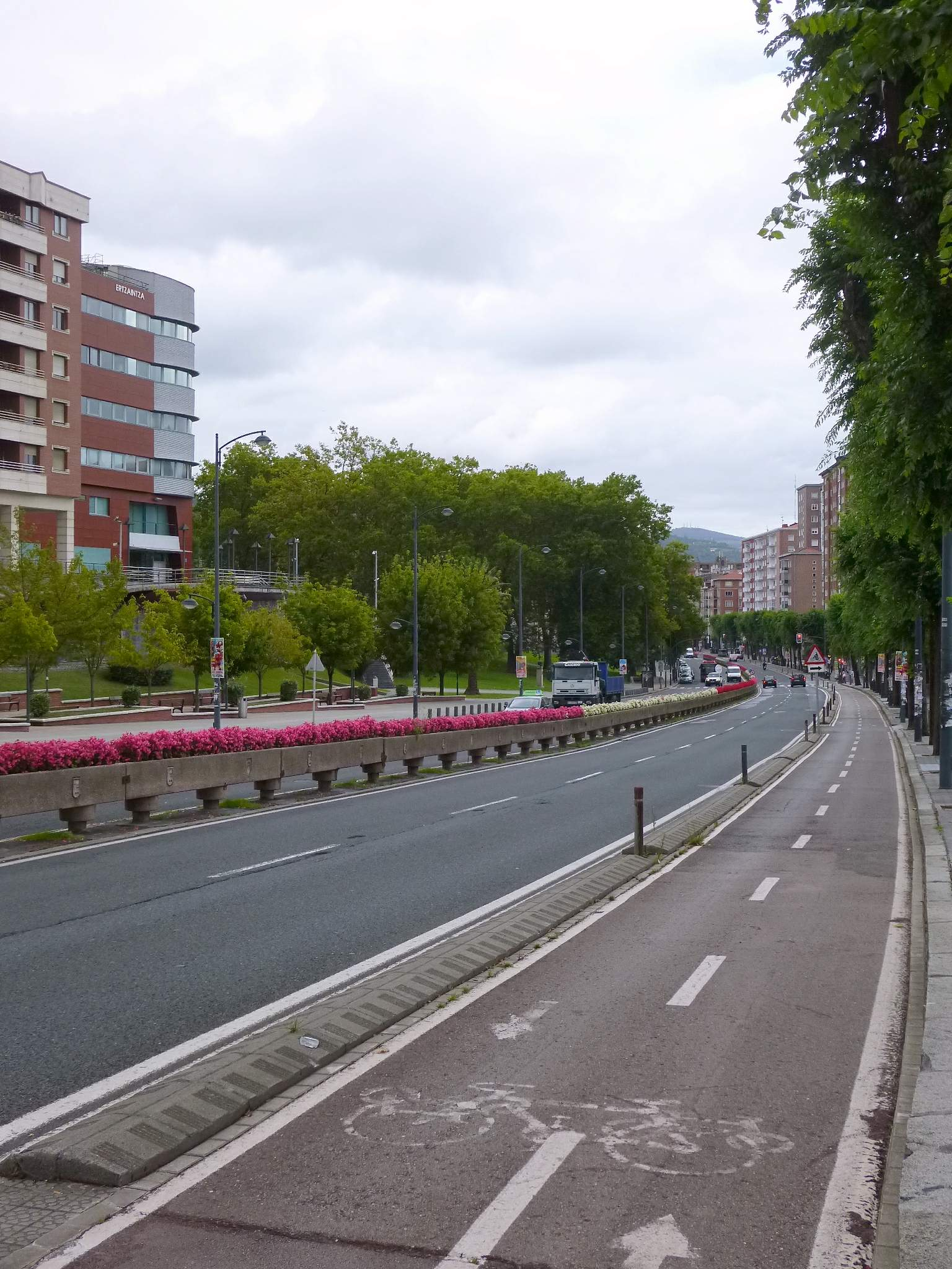 Avenida Lehendakari Aguirre (Bilbao)